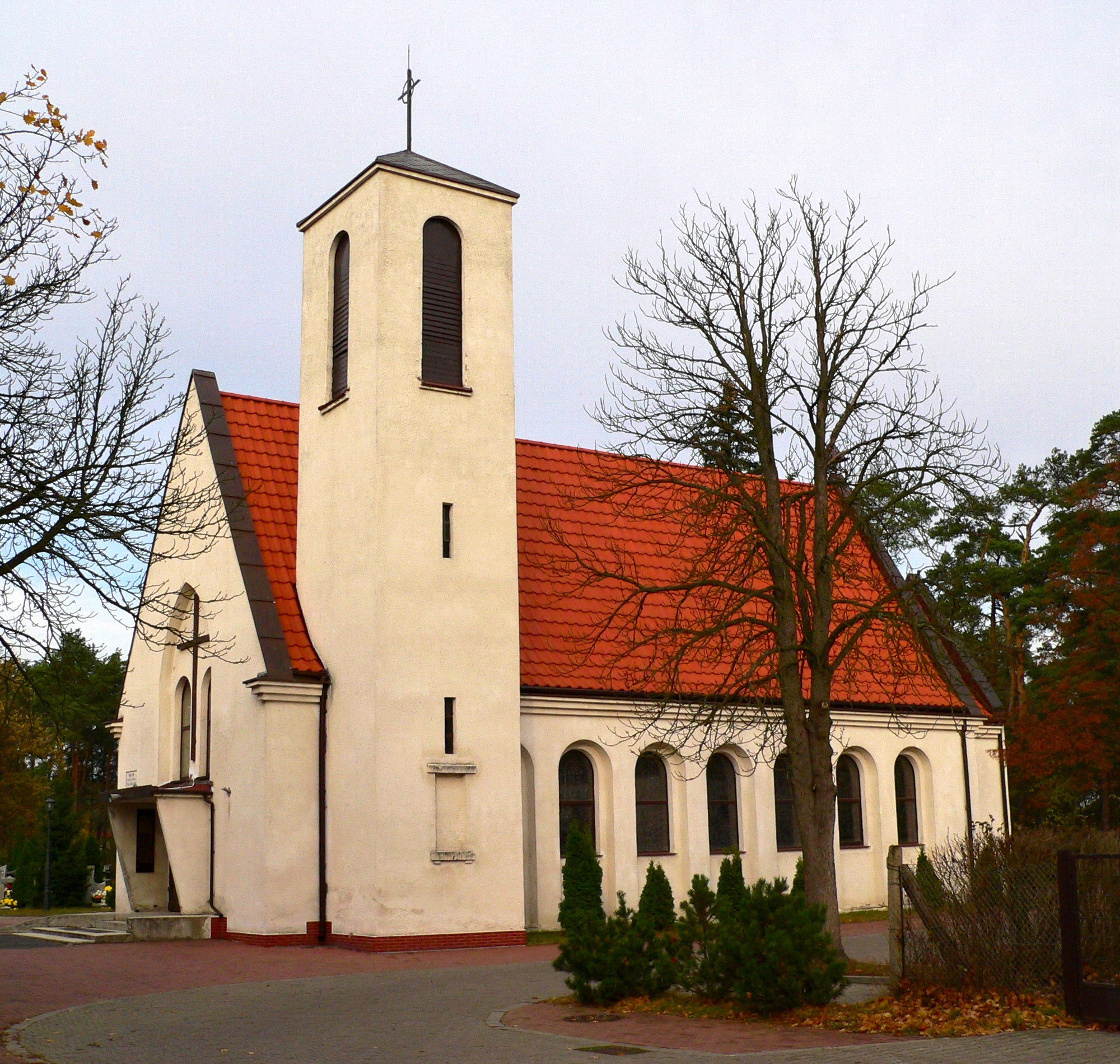 Kościół Najświętszej Maryi Panny Królowej Polski w Cierpicach, woj. kujawsko-pomorskie.